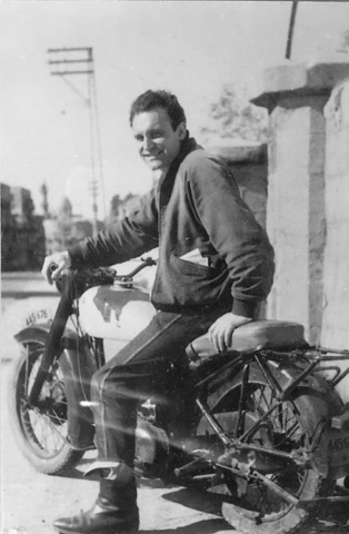 Aldo Matteotti durante un viaggio in Israele, 1963